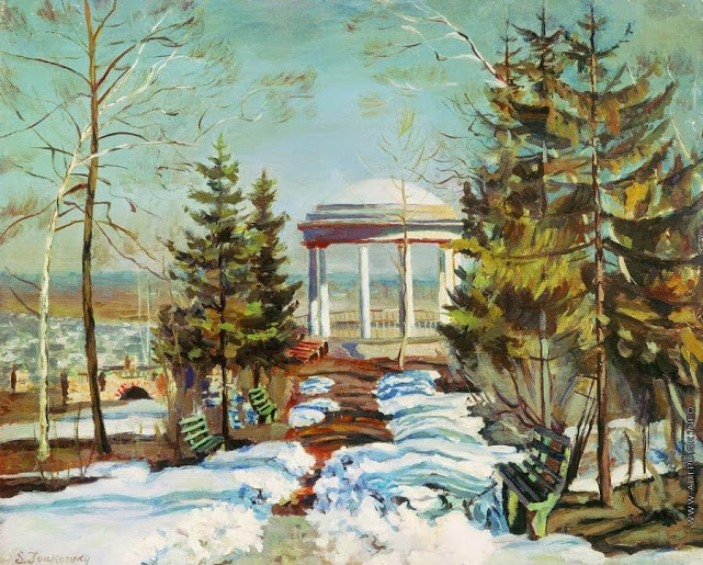 Ранняя вясна (Альтанка ў парку). Дата ўзята з крыніцы, але паколькі С. Жукоўскі жыў у Вятцы ў 1919-21, то хутчэй за ўсё, яна памылковая